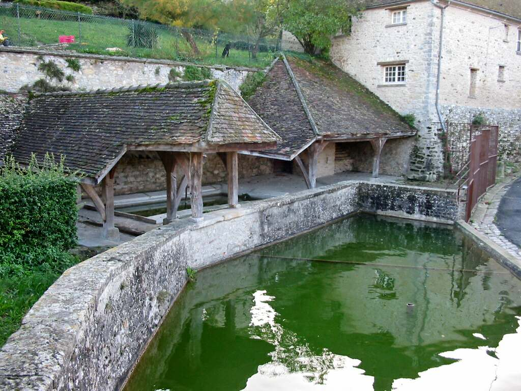 Jumeauville (Yvelines), le lavoir Photo JH Mora, novembre 2005